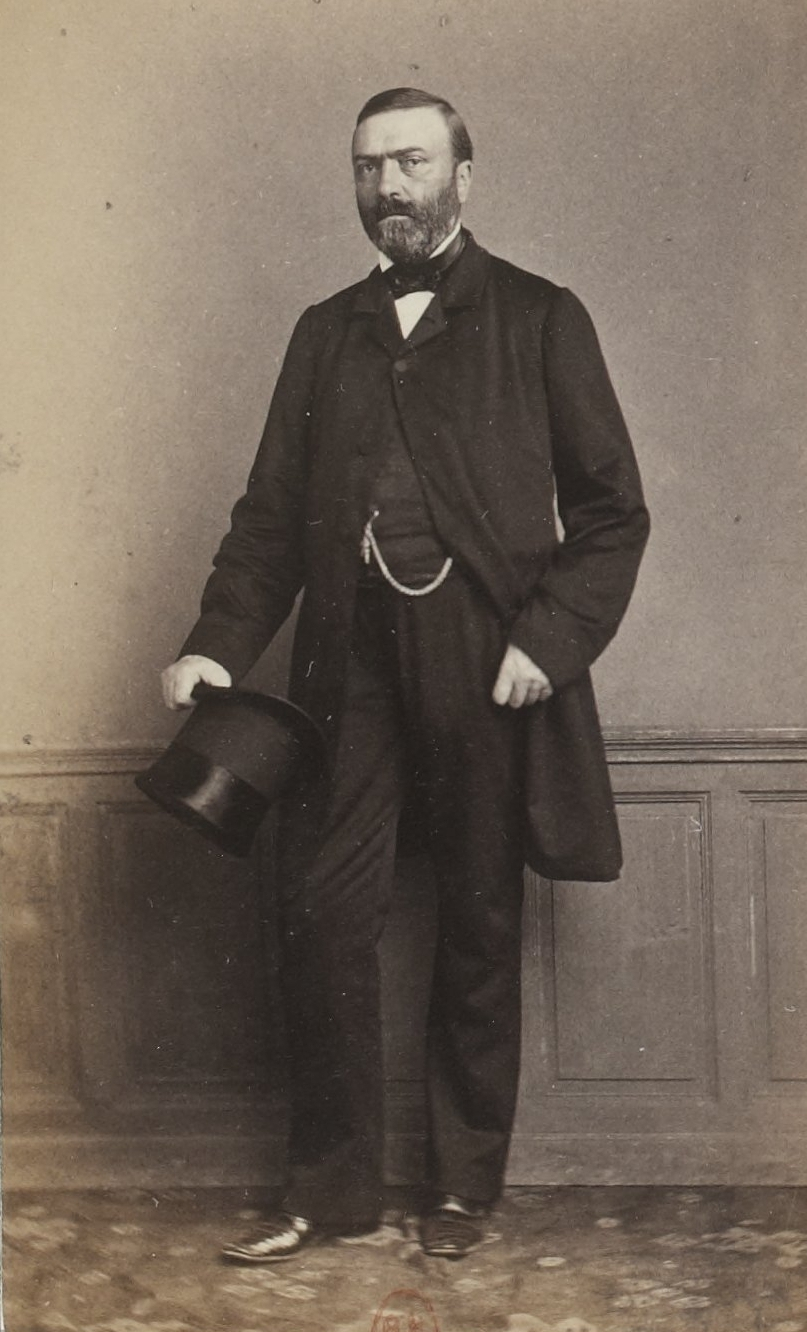 Album des députés au Corps législatif entre 1852-1857.